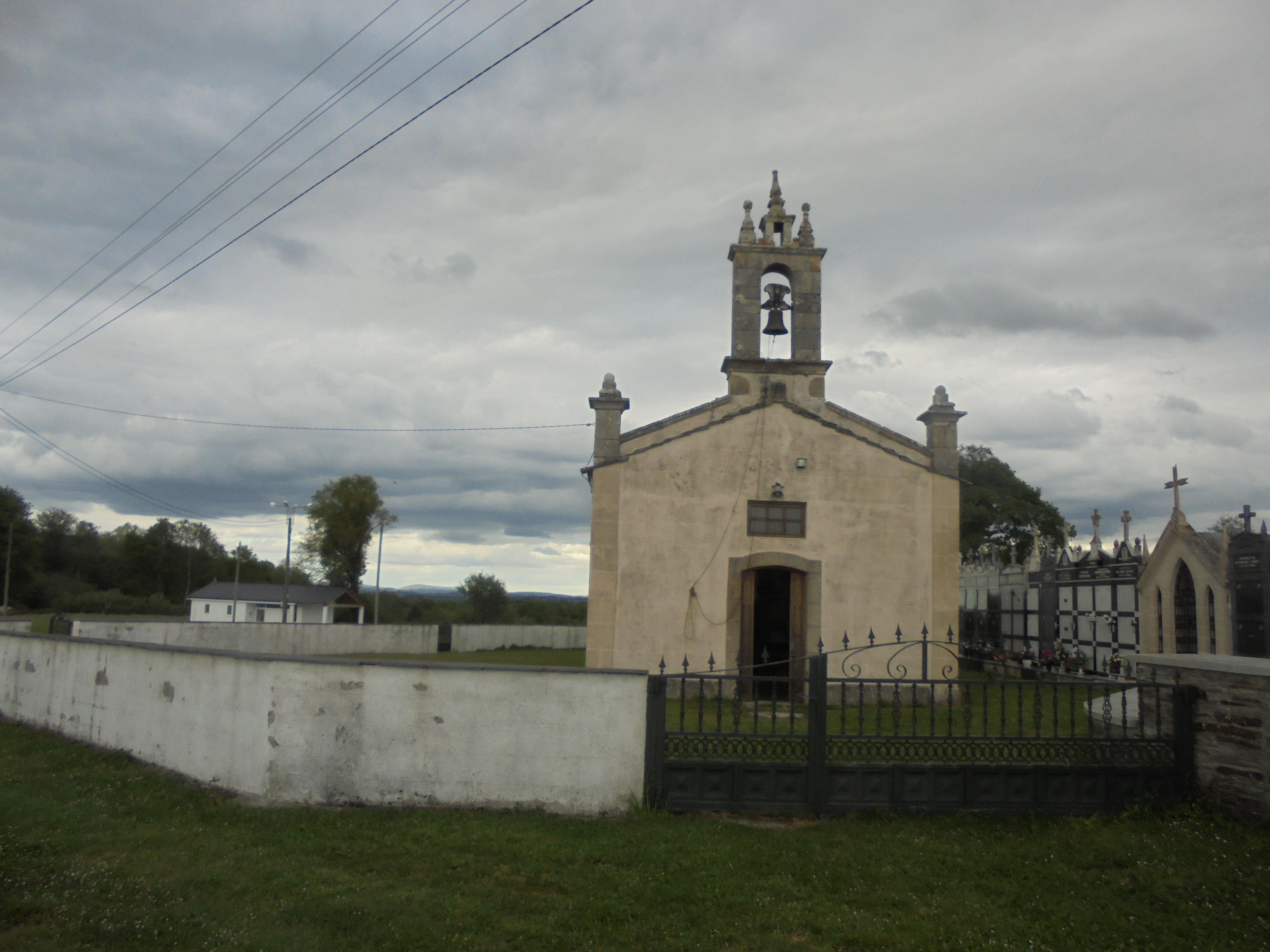 Igrexa parroquial de Sobrada ( Outeiro de Rei)